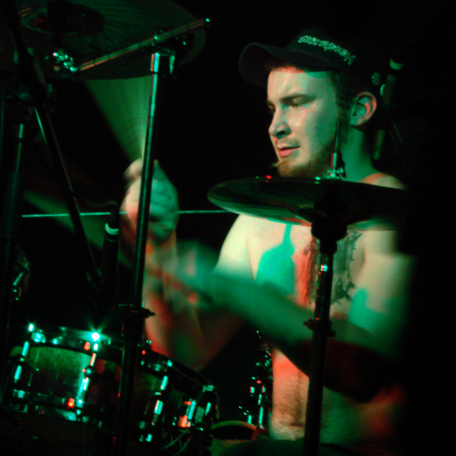 Benighted au Chaulnes Fest 08, le 22/03/08: Kevin.